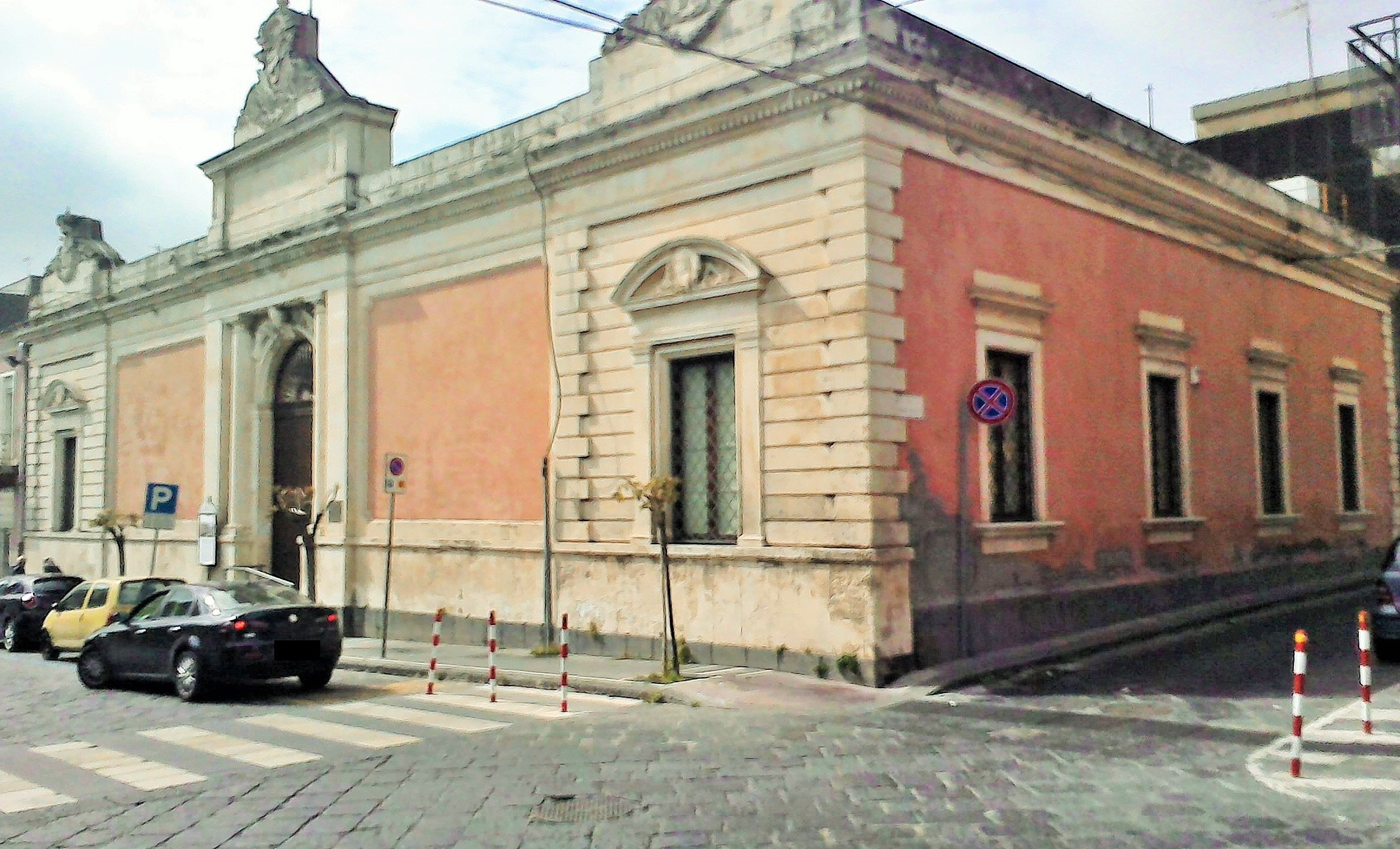 La biblioteca comunale (ex ospizio del XVIII secolo) - Misterbianco